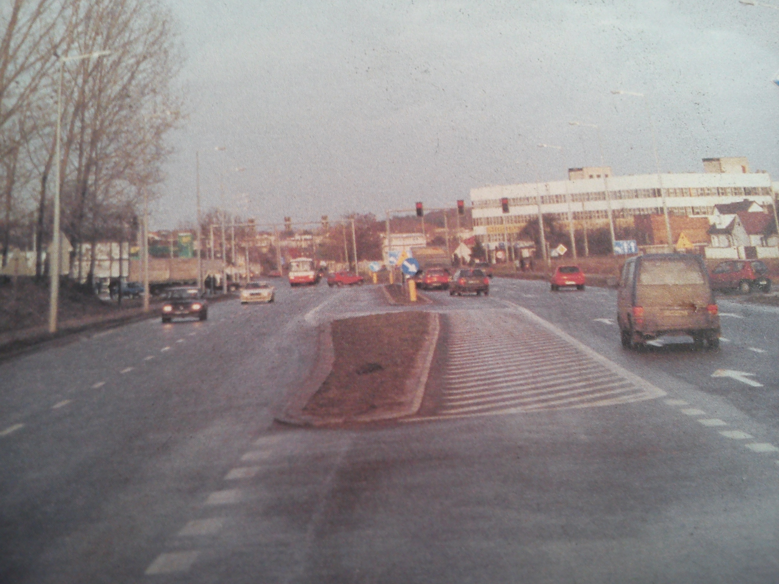 Ulica Przemysłowa w Koninie